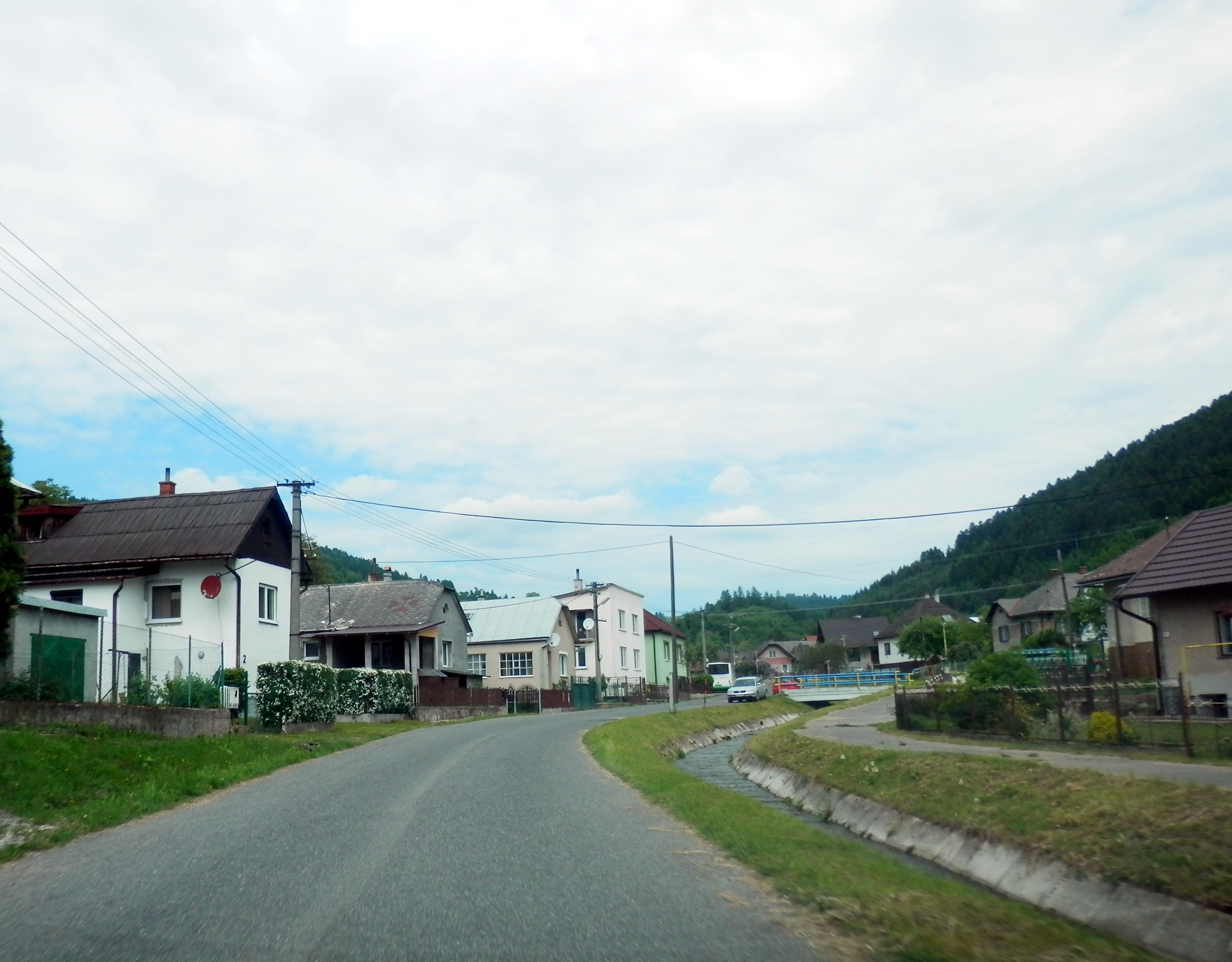 Intravilán obce Poľanovce, okres Levoča.